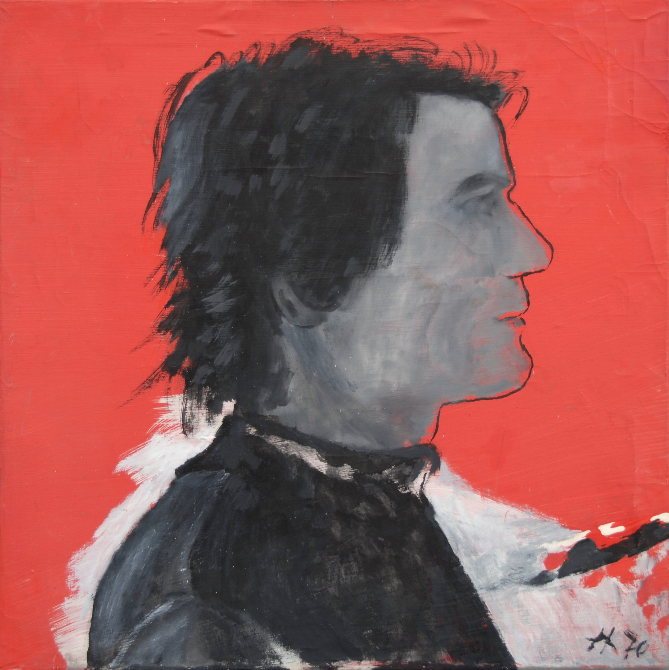 Taidemaalari Tuomo Lukkarin omakuva, öljyväriteos kankaalle. Kuvassa punaisella taustalla harmaa miehen silhuetti.